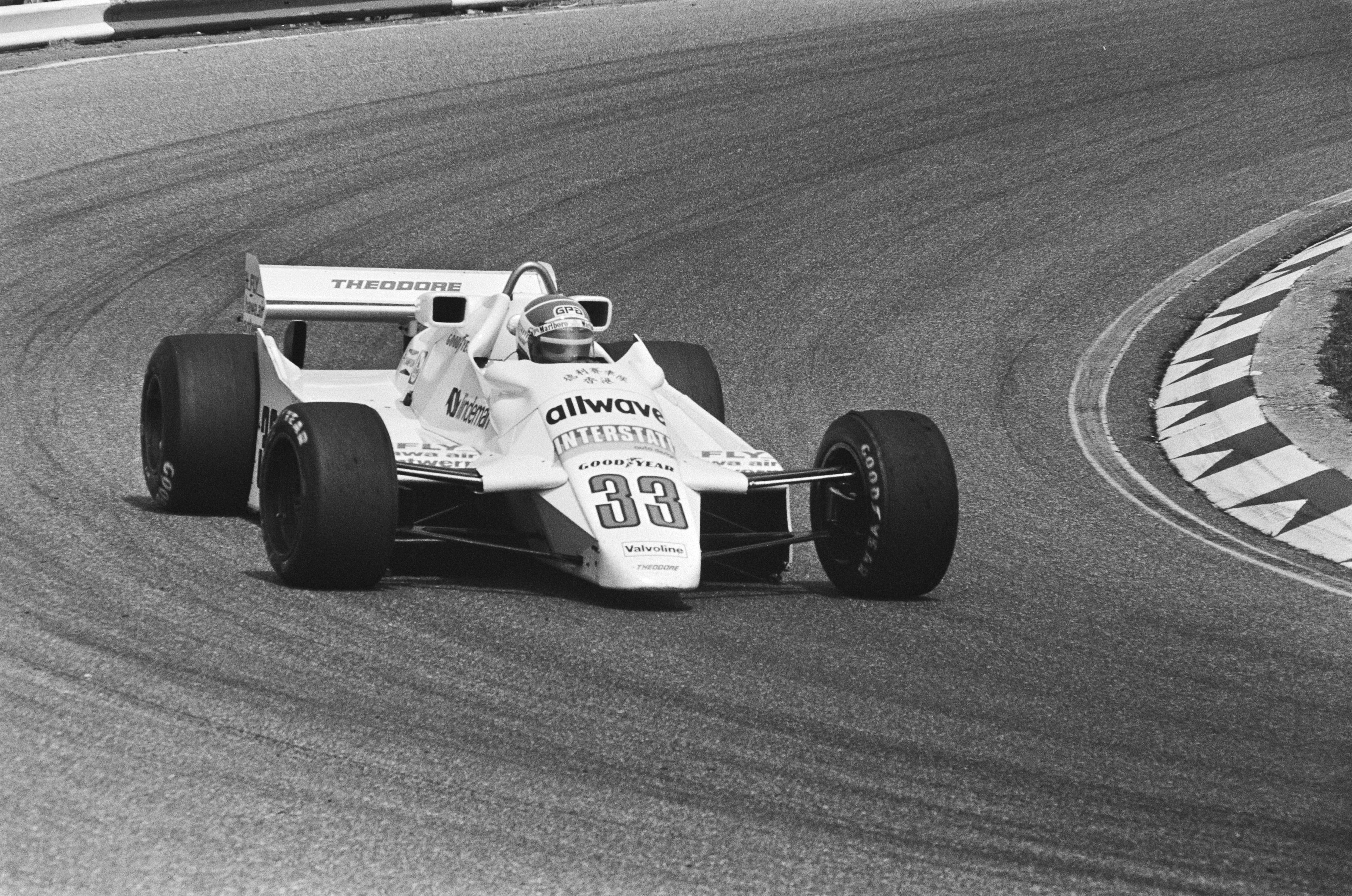 Training Grand Prix van Zandvoort ; Jan Lammers in aktie.